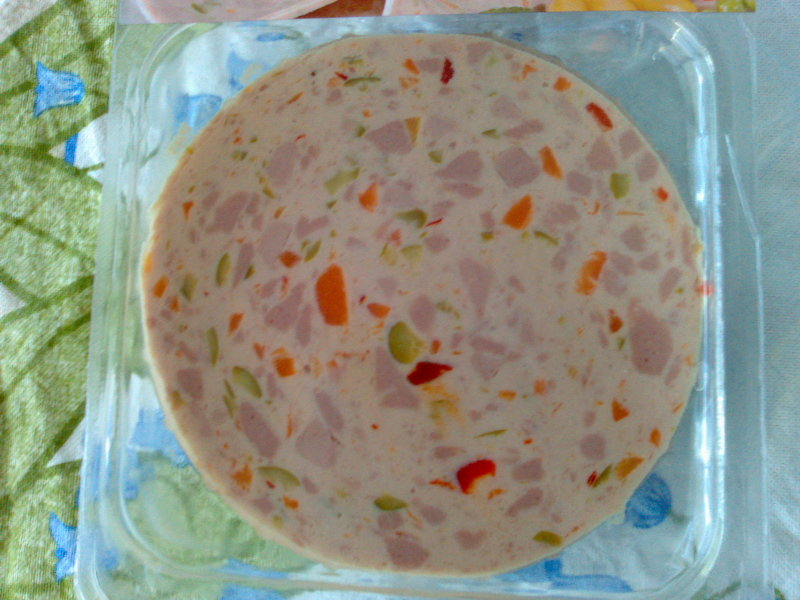 Galantine de vegetais. Vegetable galantine.